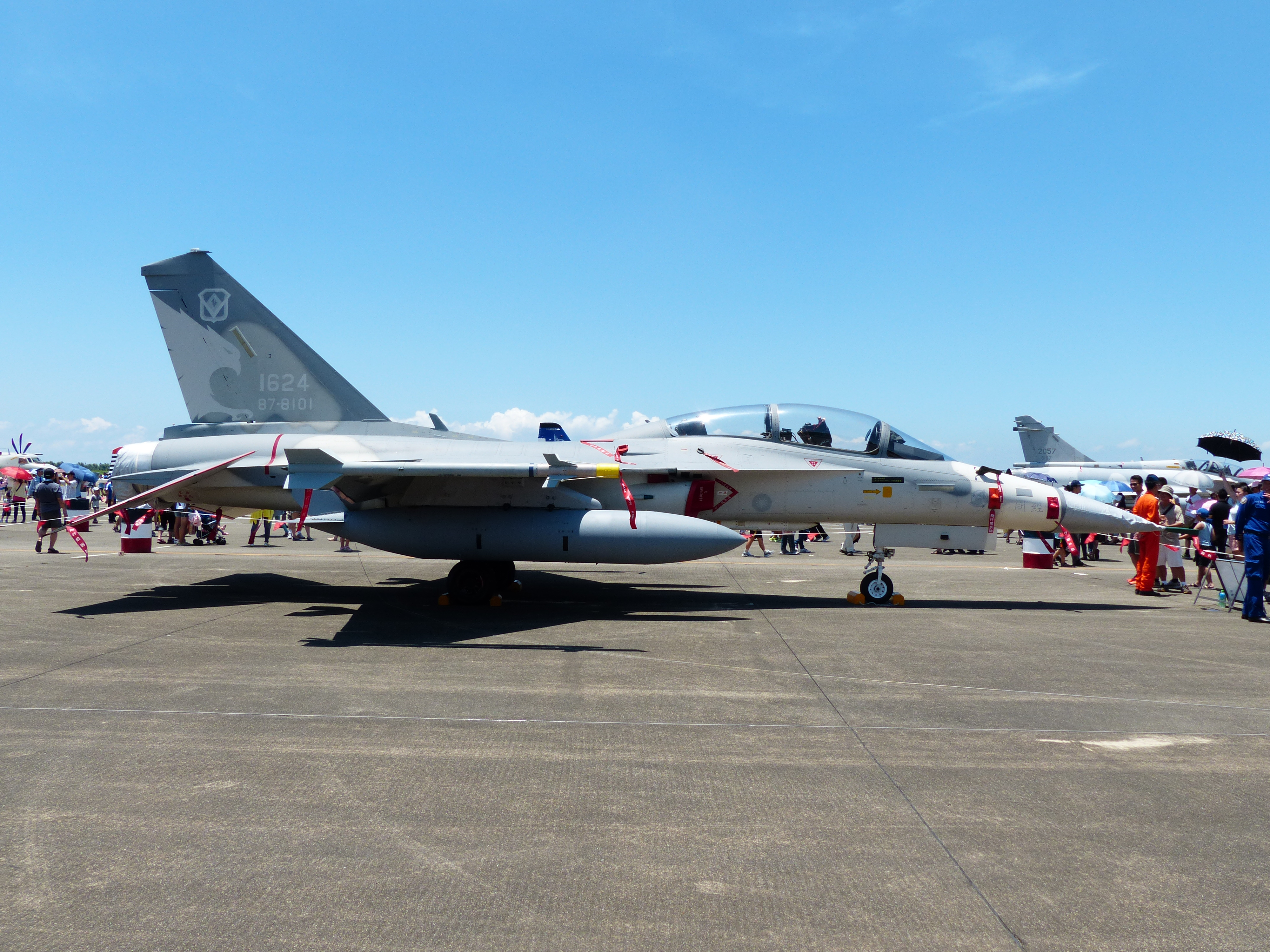 2013年臺南空軍基地營區開放活動，停機坪靜態展示的443聯隊經國號F-CK-1B 1624右側面。